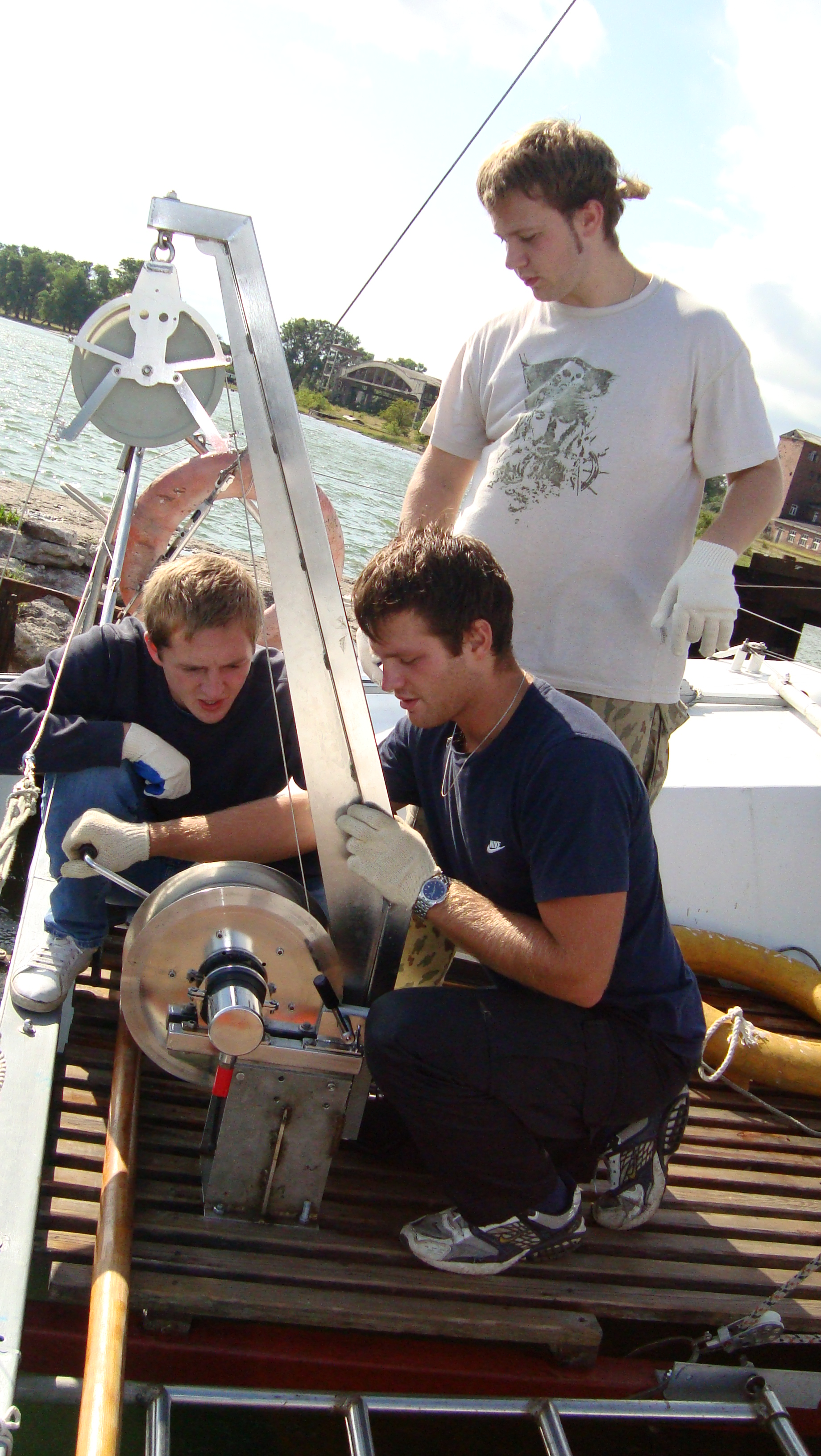 Работа студентов в море на учебной практике